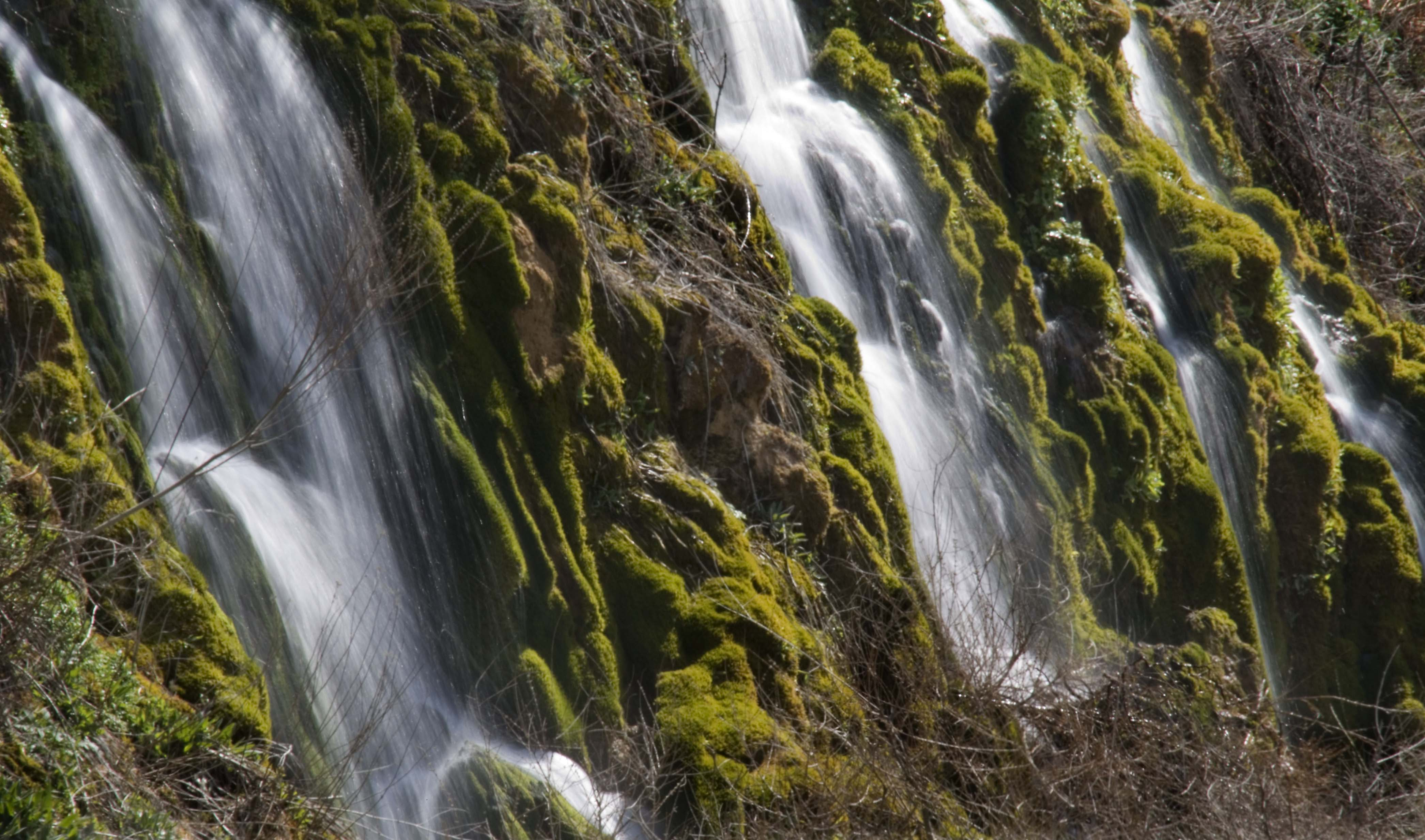 La Font de Sant Critòfol (San Cristobal en castellà), situada sota el pont de la carretera que està entre El Pont de Serradui i Biasques d'Ovarra, a la Ribagorça aragonesa (Prepirineu).